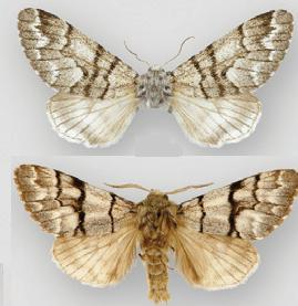 Panthea furcilla furcilla female (top), male (bottom)